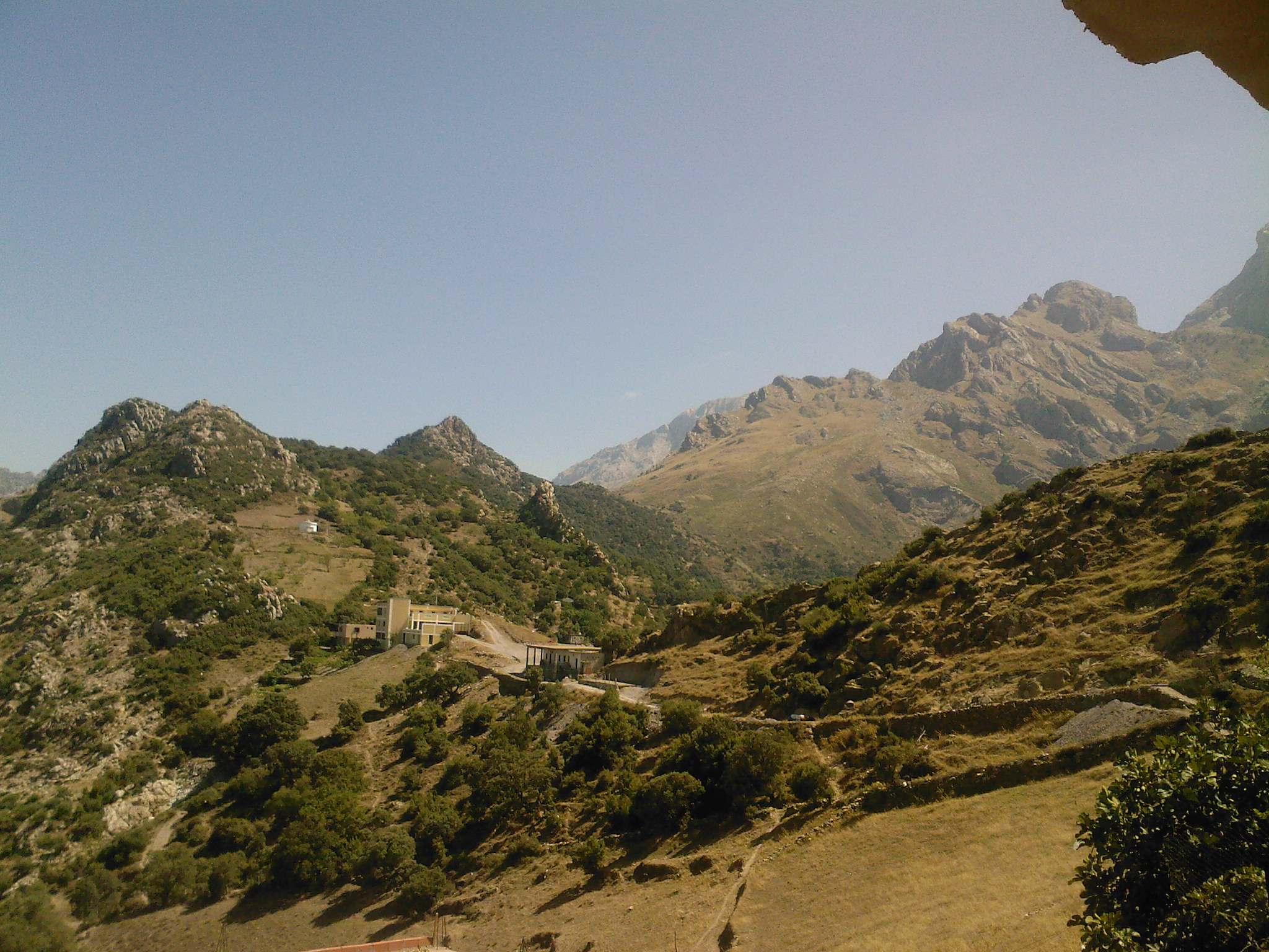 Ath Yiran -- آيت إران